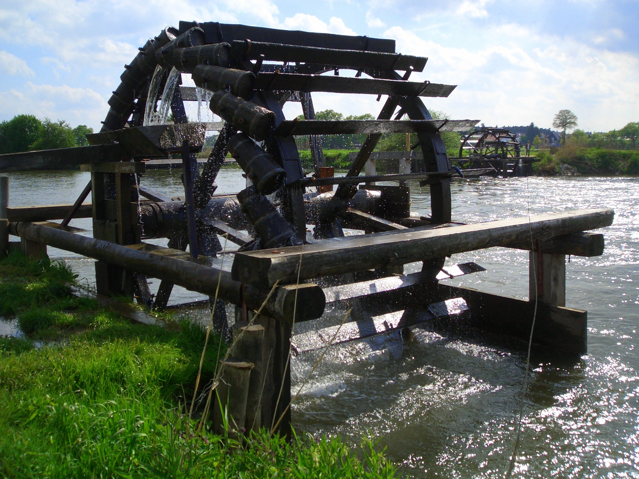 Möhrendorf Wasserschöpfräder. Im Vordergrund das Schmiedsrad, im Hintergrund das Rinig-Rad. Aufgenommen im Mai 2005.